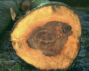 Esche mit Falschkern